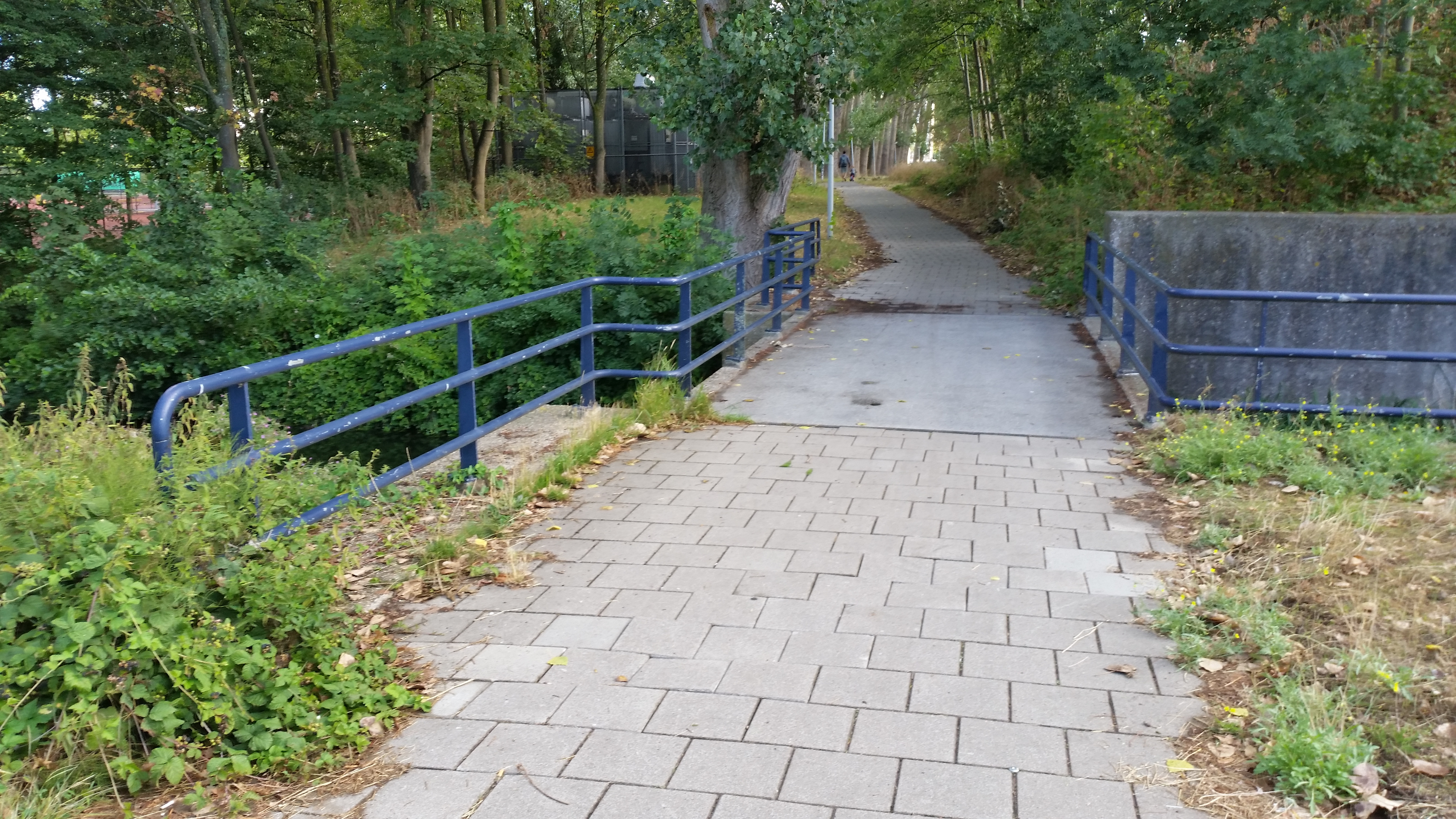 Overzichtsfoto van Brug 633 (in Amsterdam)